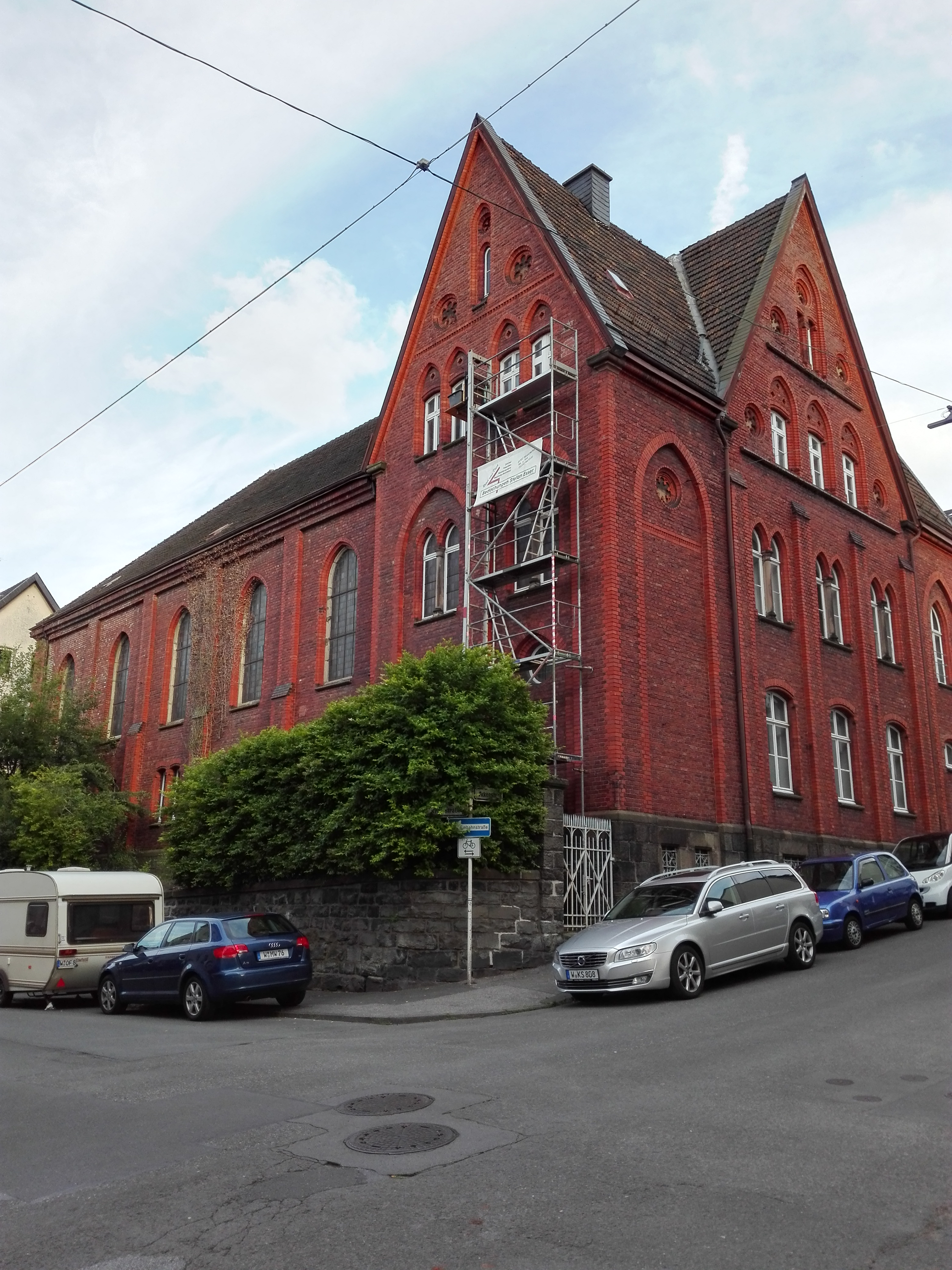 Ansichten des alten Kirchsaals Ackerstraße in Wuppertal-Heckinghausen